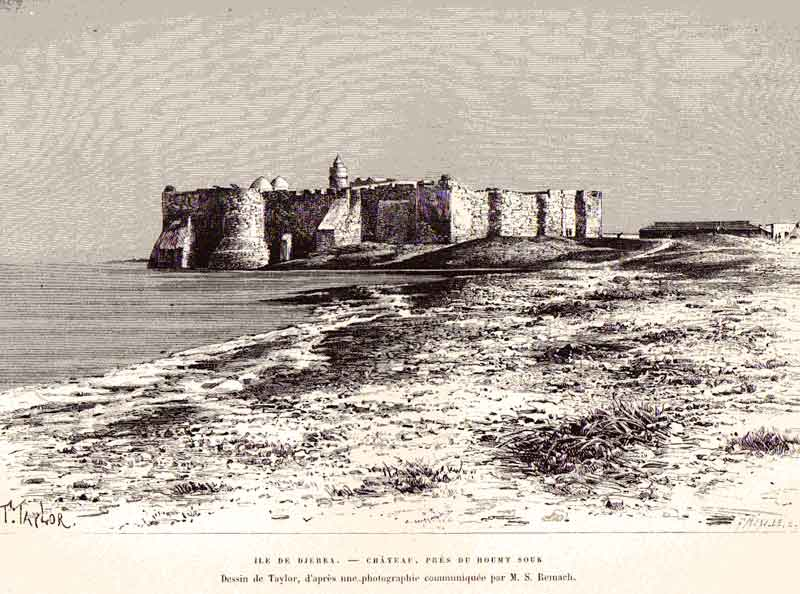 Carte postale du fort de Houmt Souk, Djerba, Tunisie